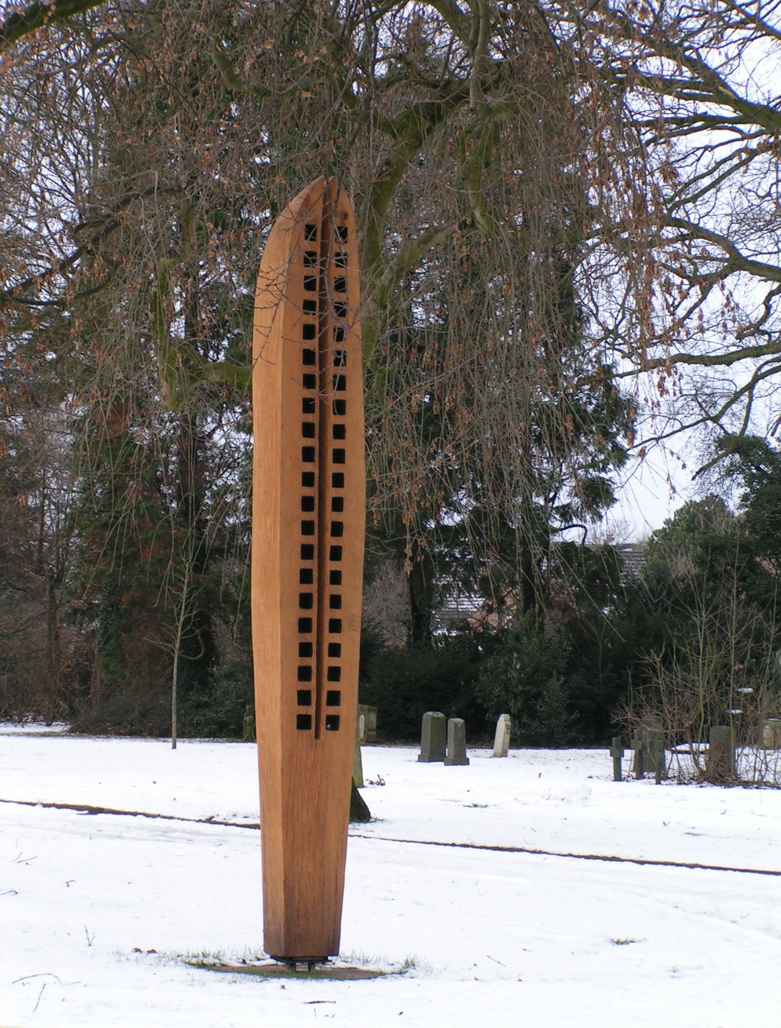 Bootstele. Eichenholzstamm, patiell gebrannt, ca. 450 x 80 x 48 cm. Stadtpark Wadersloh